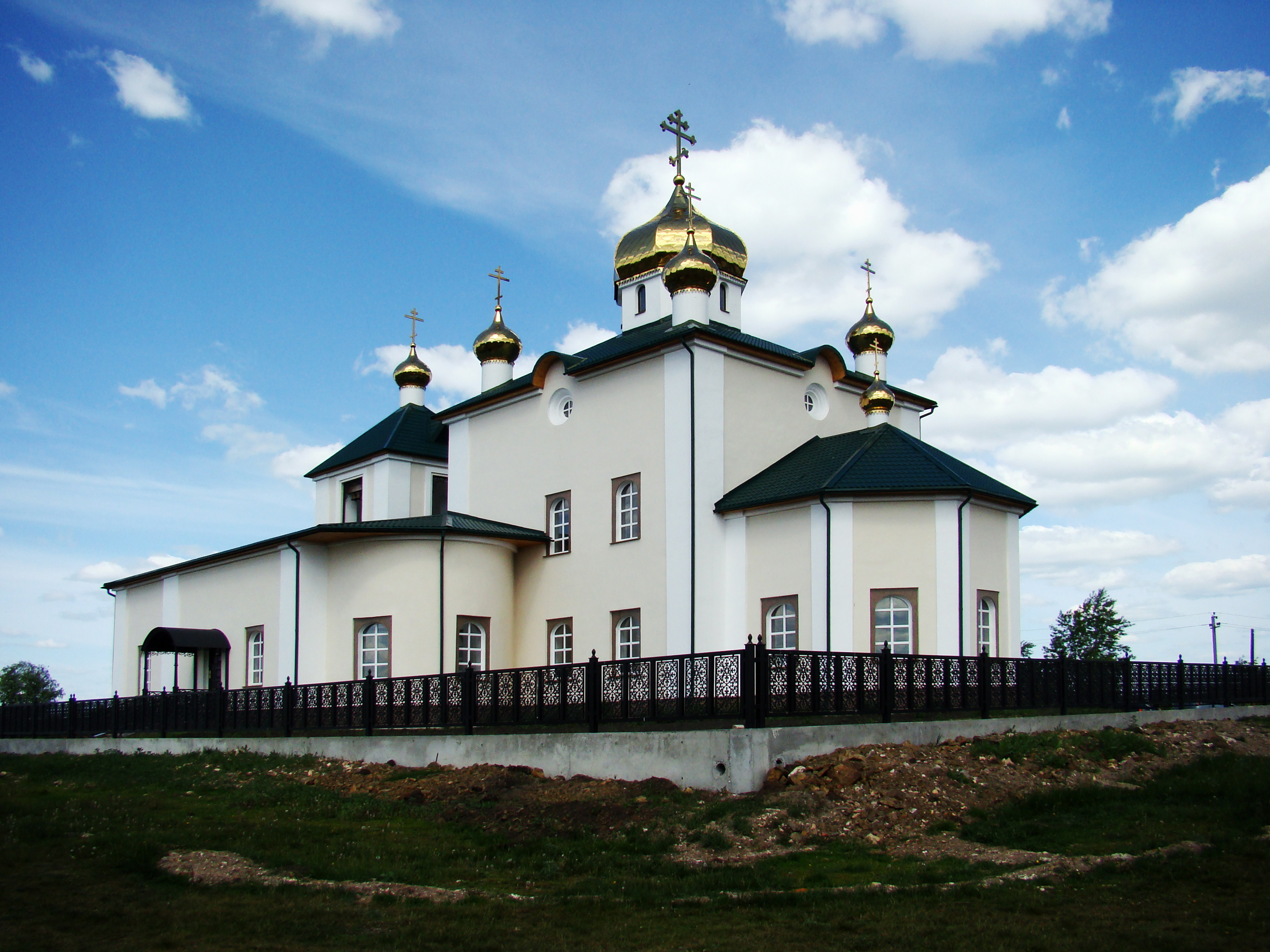 1800 г. пос. Арамашево, улица Совхозная, 6